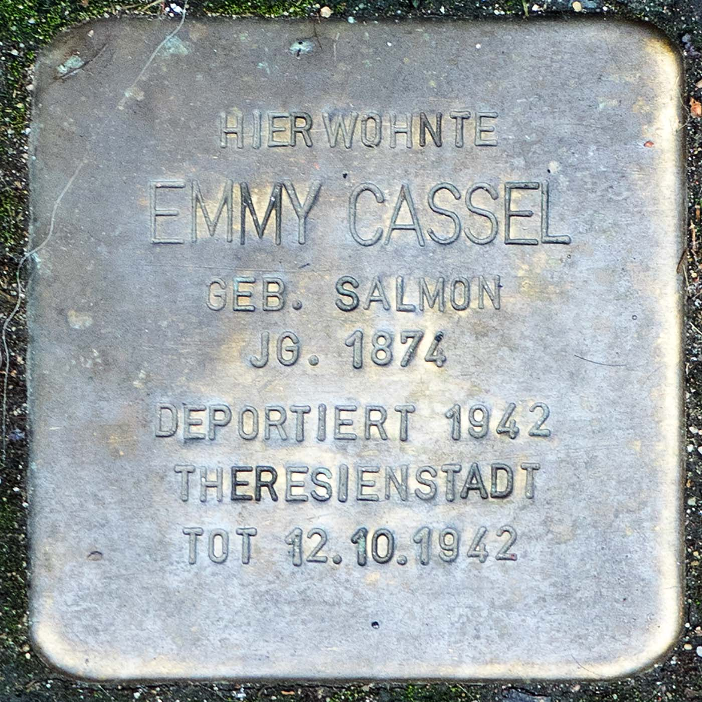 Stolperstein für Emmy Cassel (Willich)